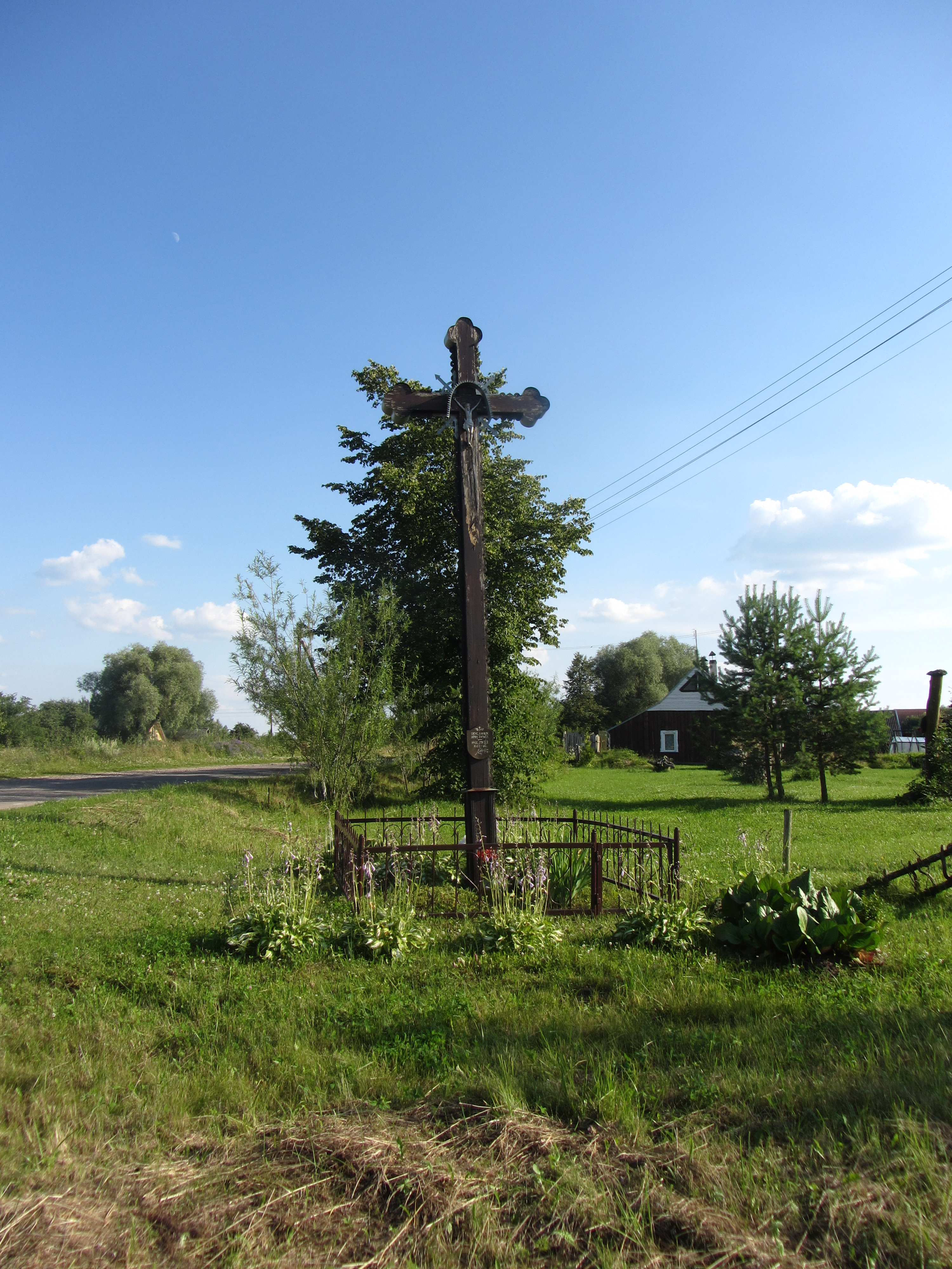 Bačkininkai 18266, Lithuania